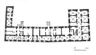 Мінск. План манастыра базыльянак